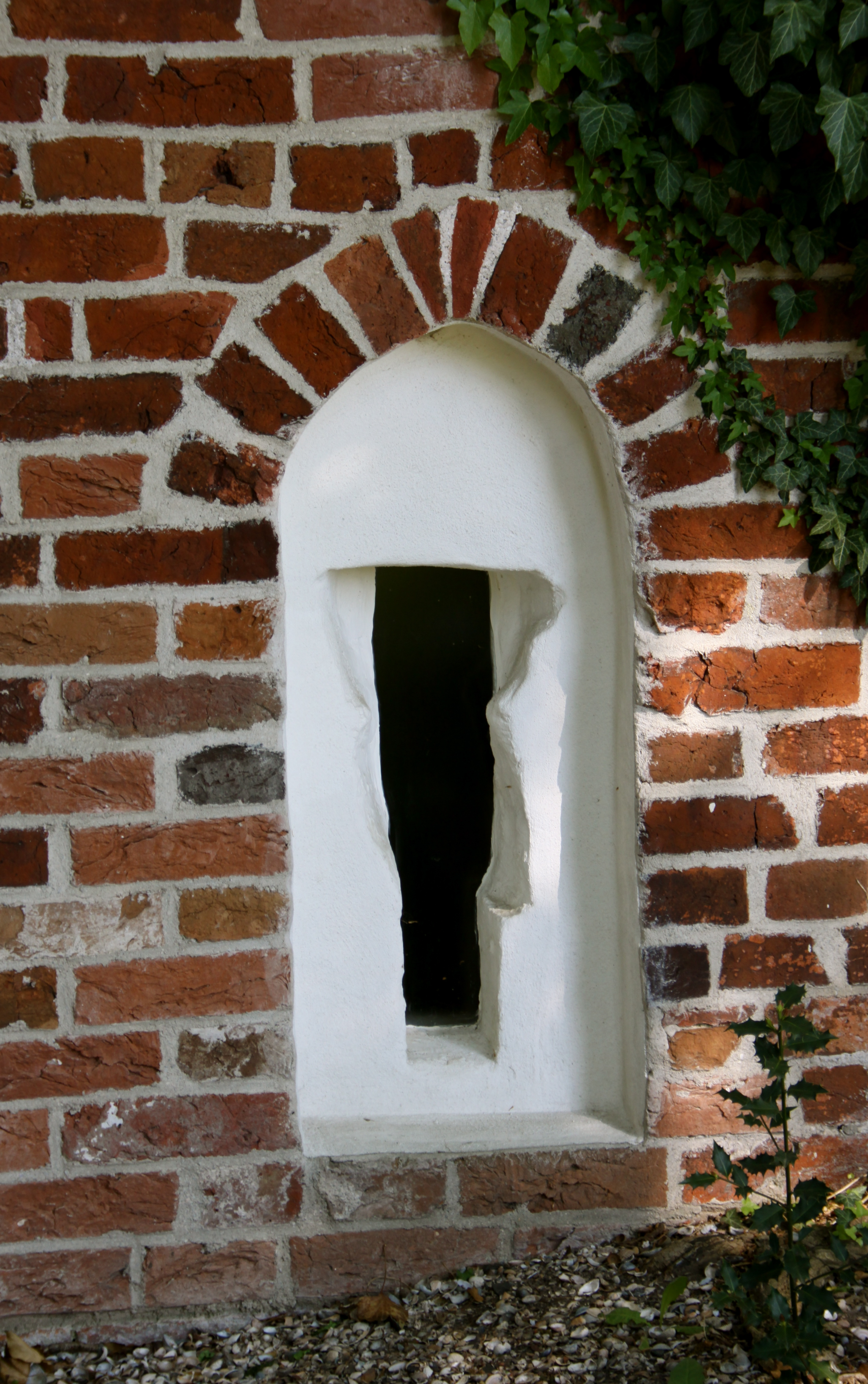 Hagioskop der Johanniterkapelle Bokelesch